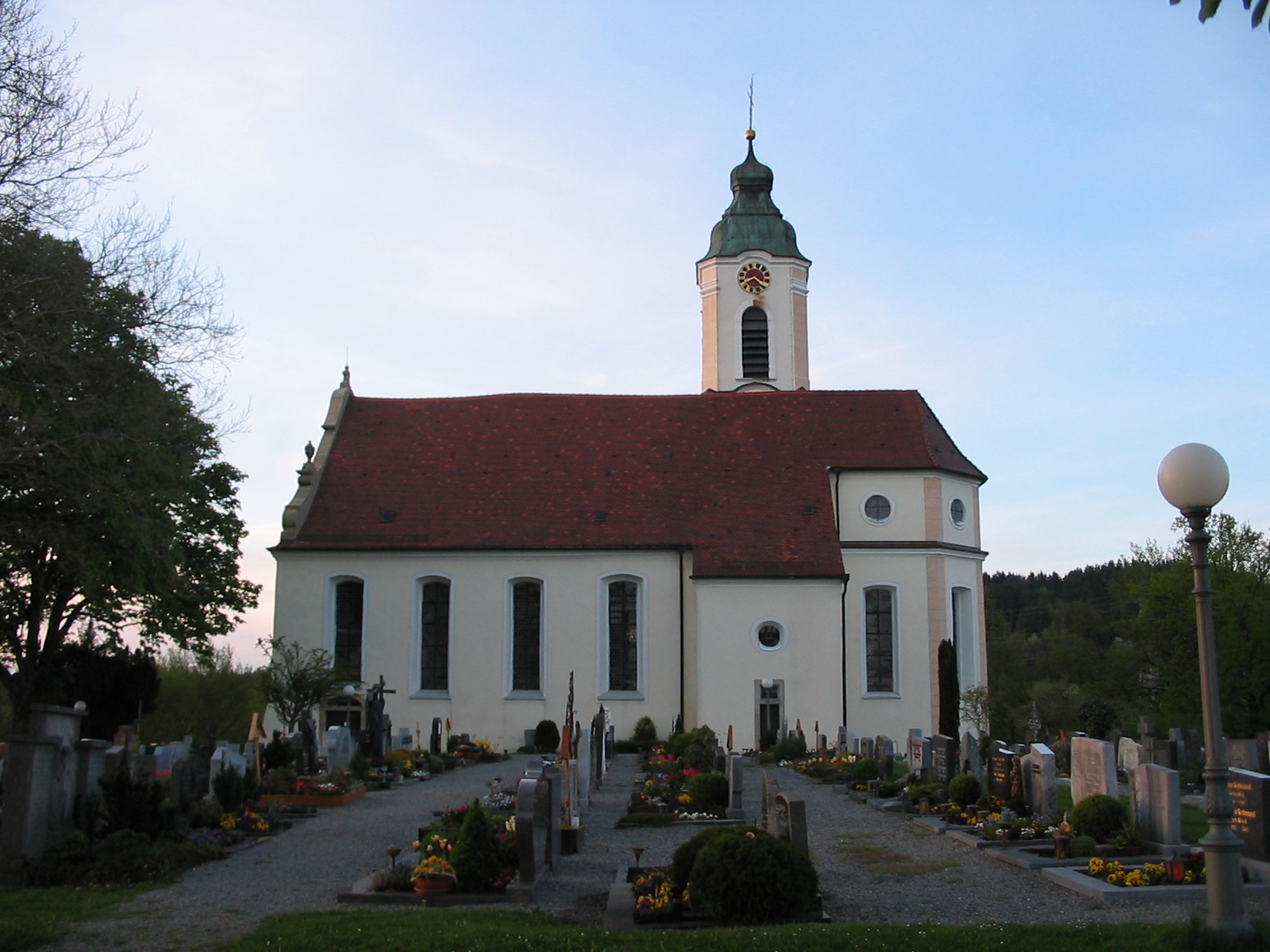 Bodnegger Kirche zu abendlicher Stunde